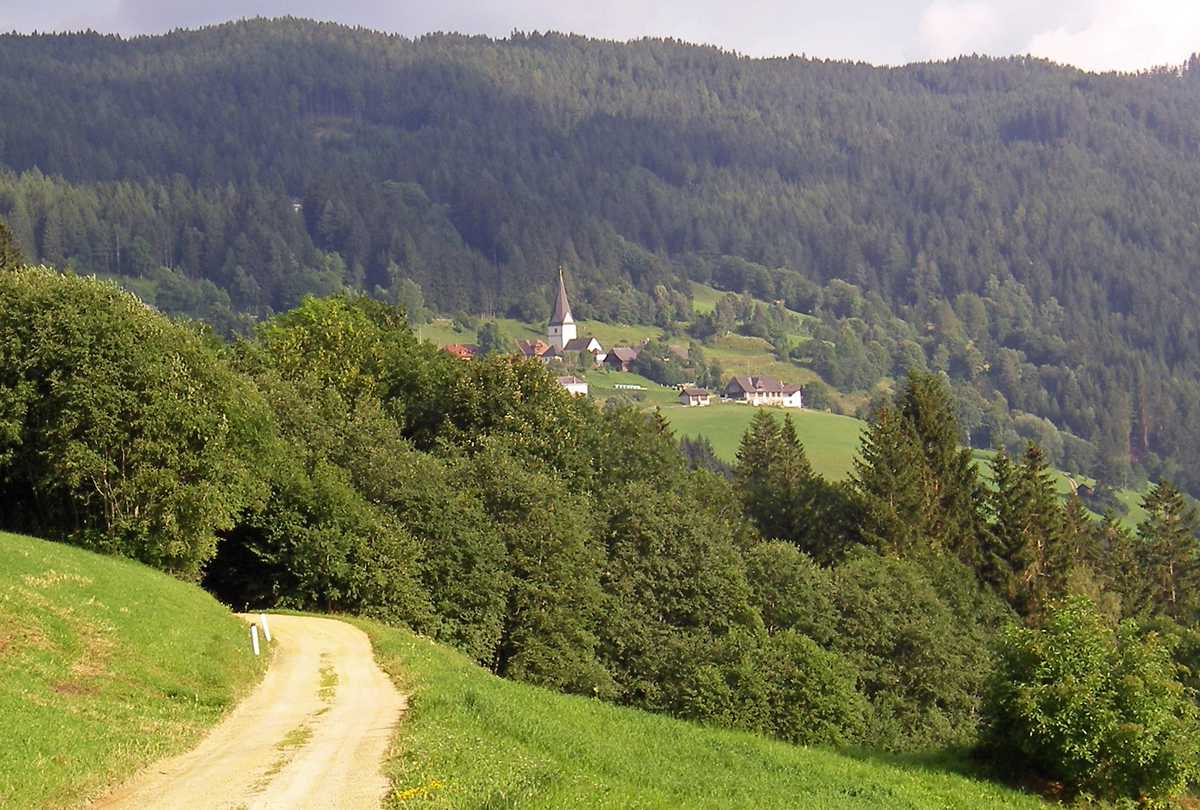 Sankt Martin am Silbreberg, gesehen vom Weg aus Mühlen